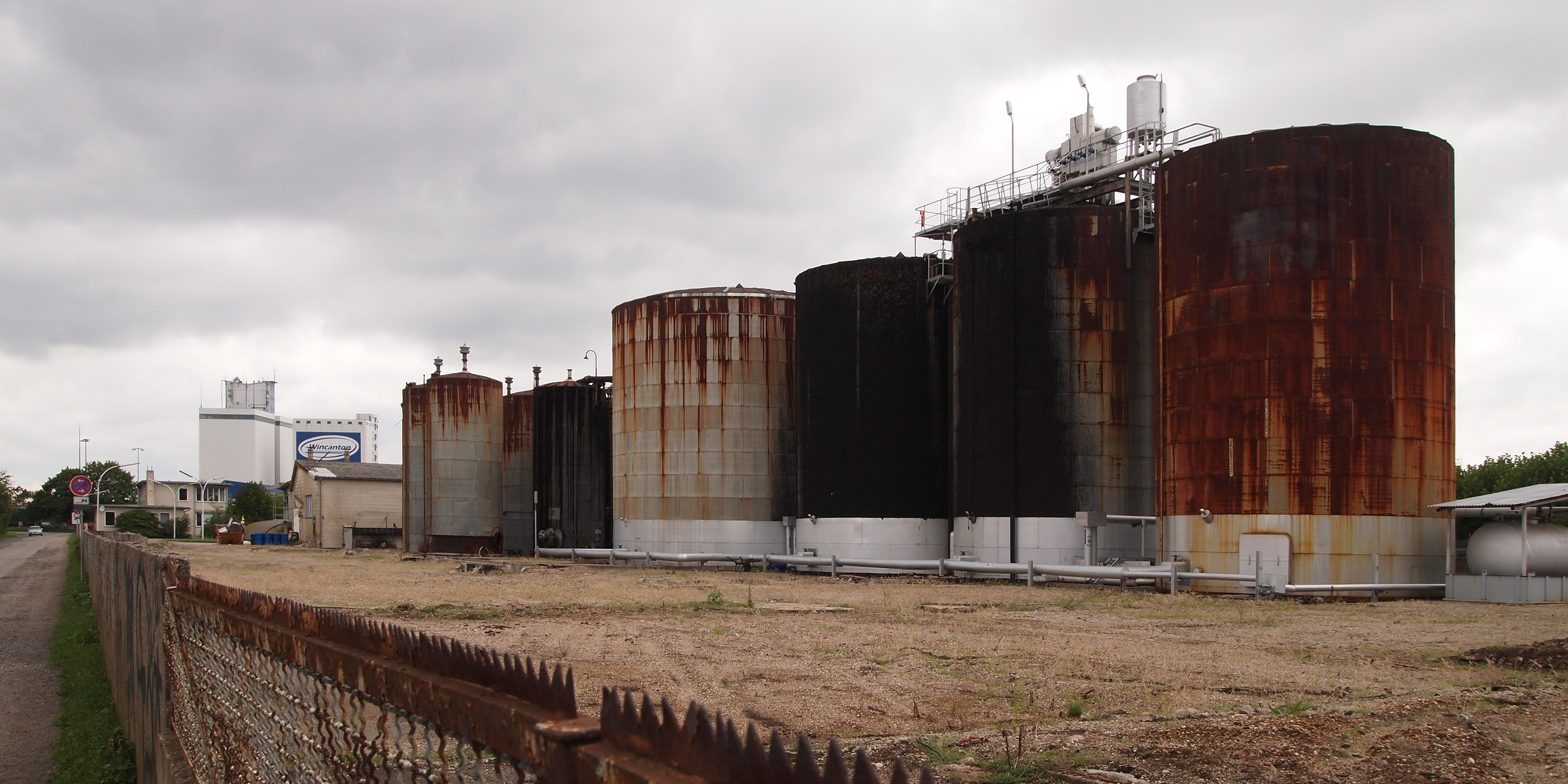 Tanks auf dem Gelände der Bitumina in Worms